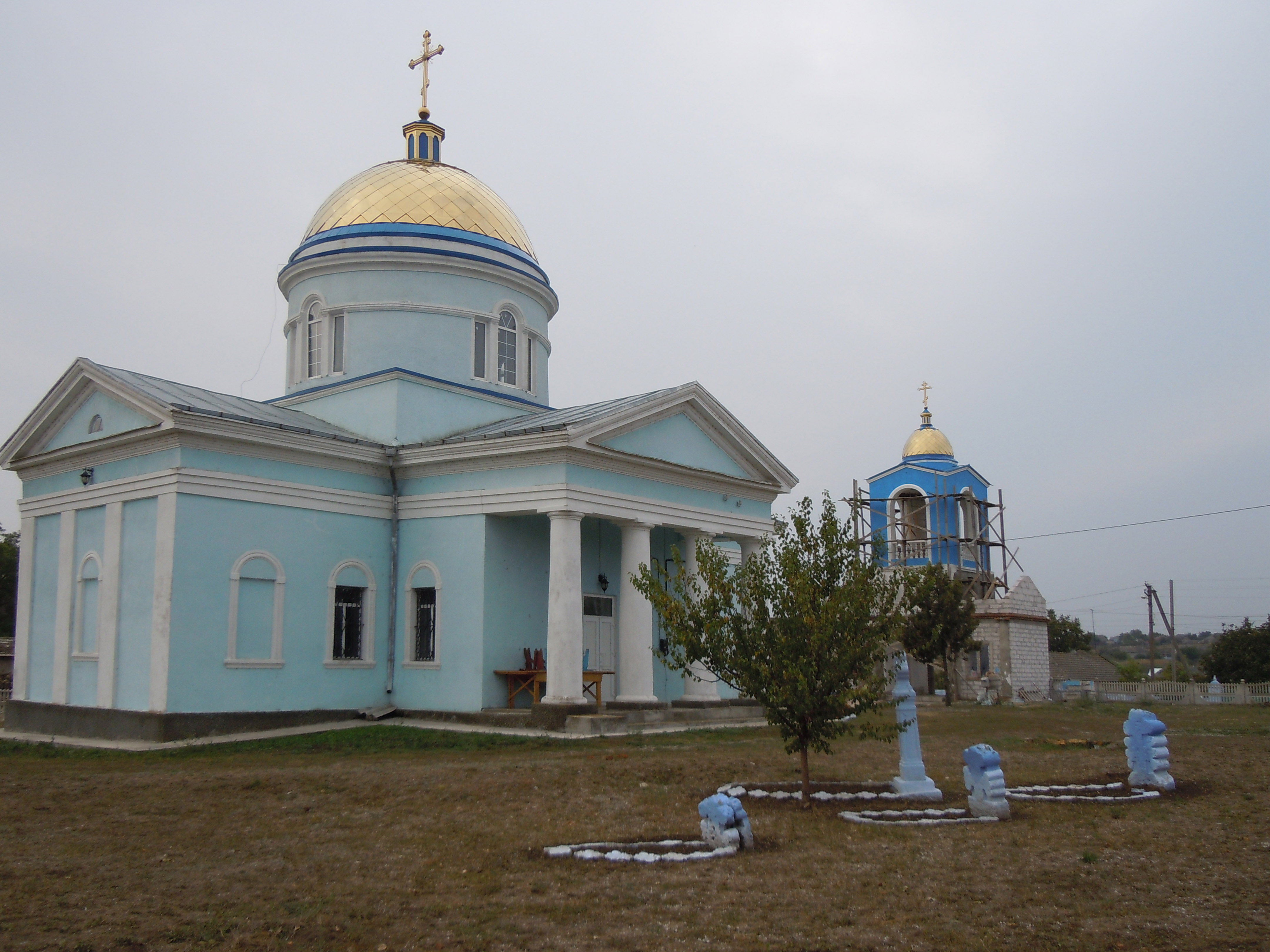 Успенська церква, село Кирнички